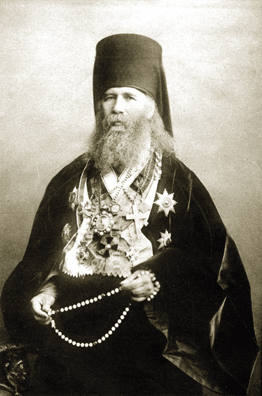 Архиепископ Никанор (Бровкович, 1826-1890)